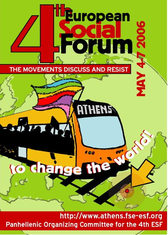 Символ 4-го Европейского соцфорума